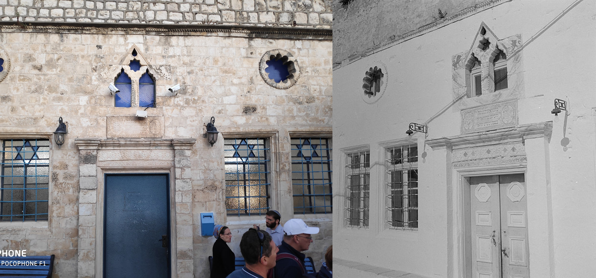 חזית בית הכנסת הארי האשכנזי לפני ואחרי שיפוצו